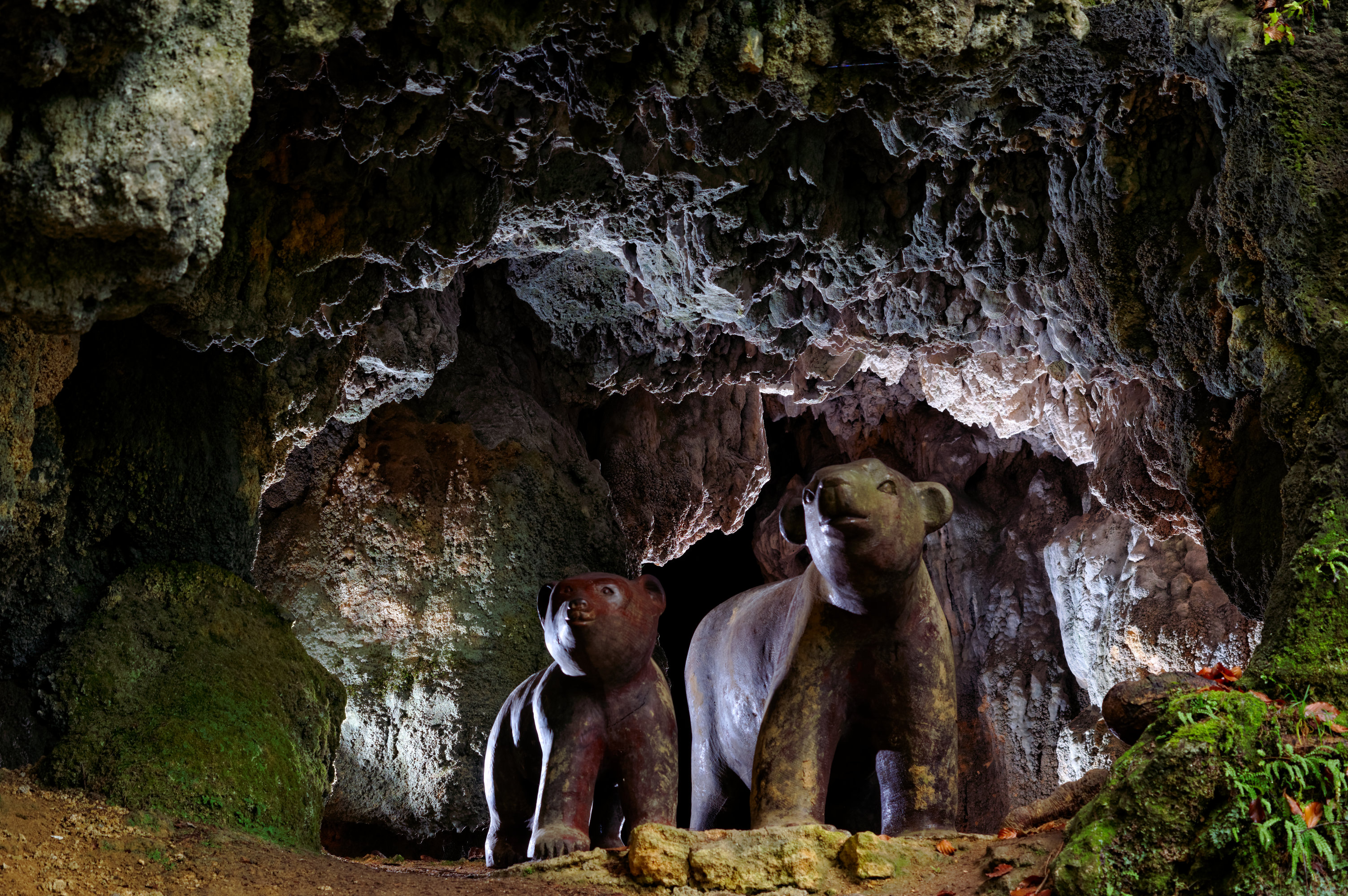 Les Nans (39) : la grotte, ses deux ours né en 2000 et 2006